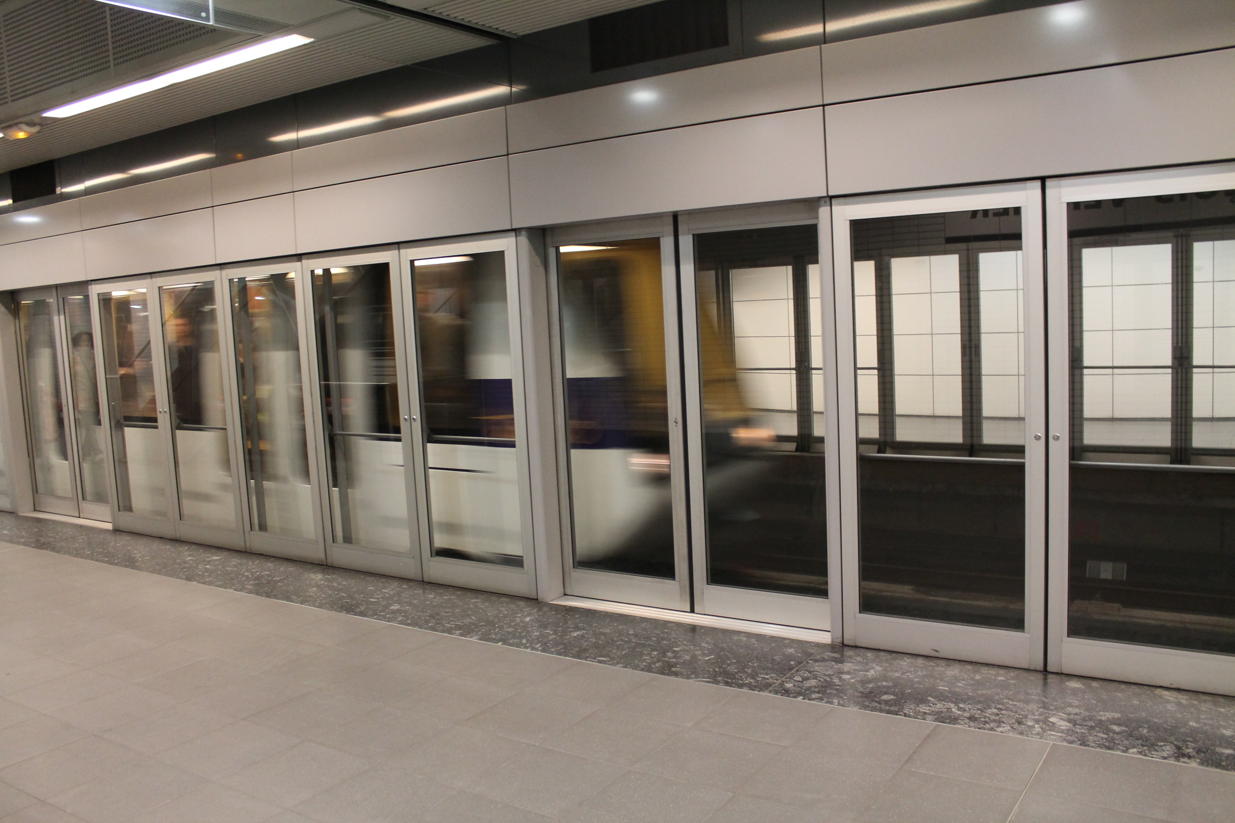 Une rame de VAL208 arrive en station François Verdier, ligne B du métro de Toulouse.